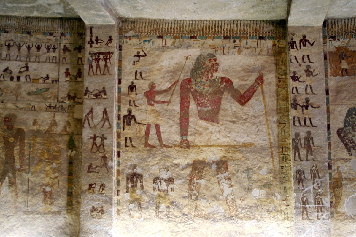 Beni Hassan - Représentation de Khety dans sa tombe (BH17)